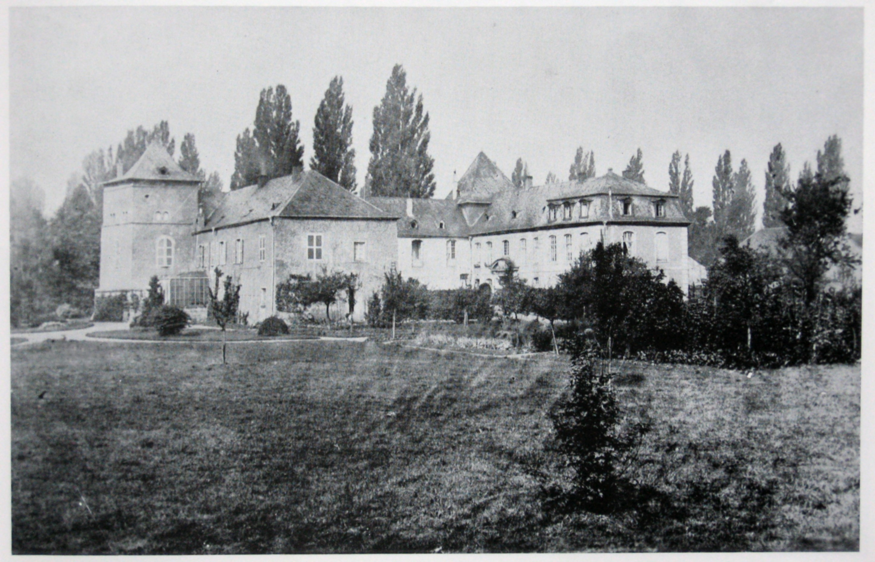 Altes Schloss in Dillingen/Saar um 1900